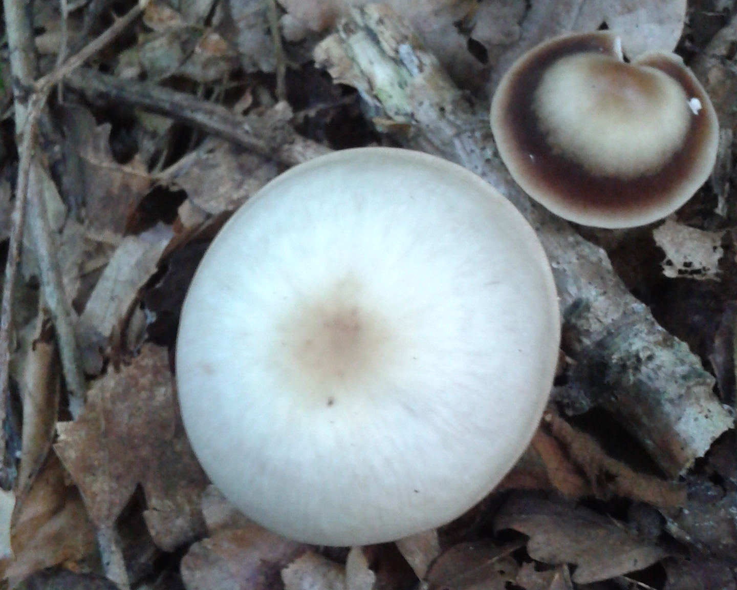 Collybie beurrée, collybia butyracea var. asema (nord pas de calais) nuance couleurs